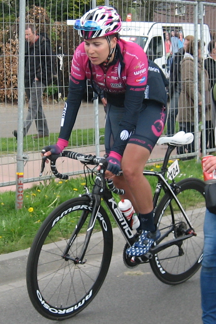 Na de finish van de Amstel Gold Race Ladies Edition 2017.